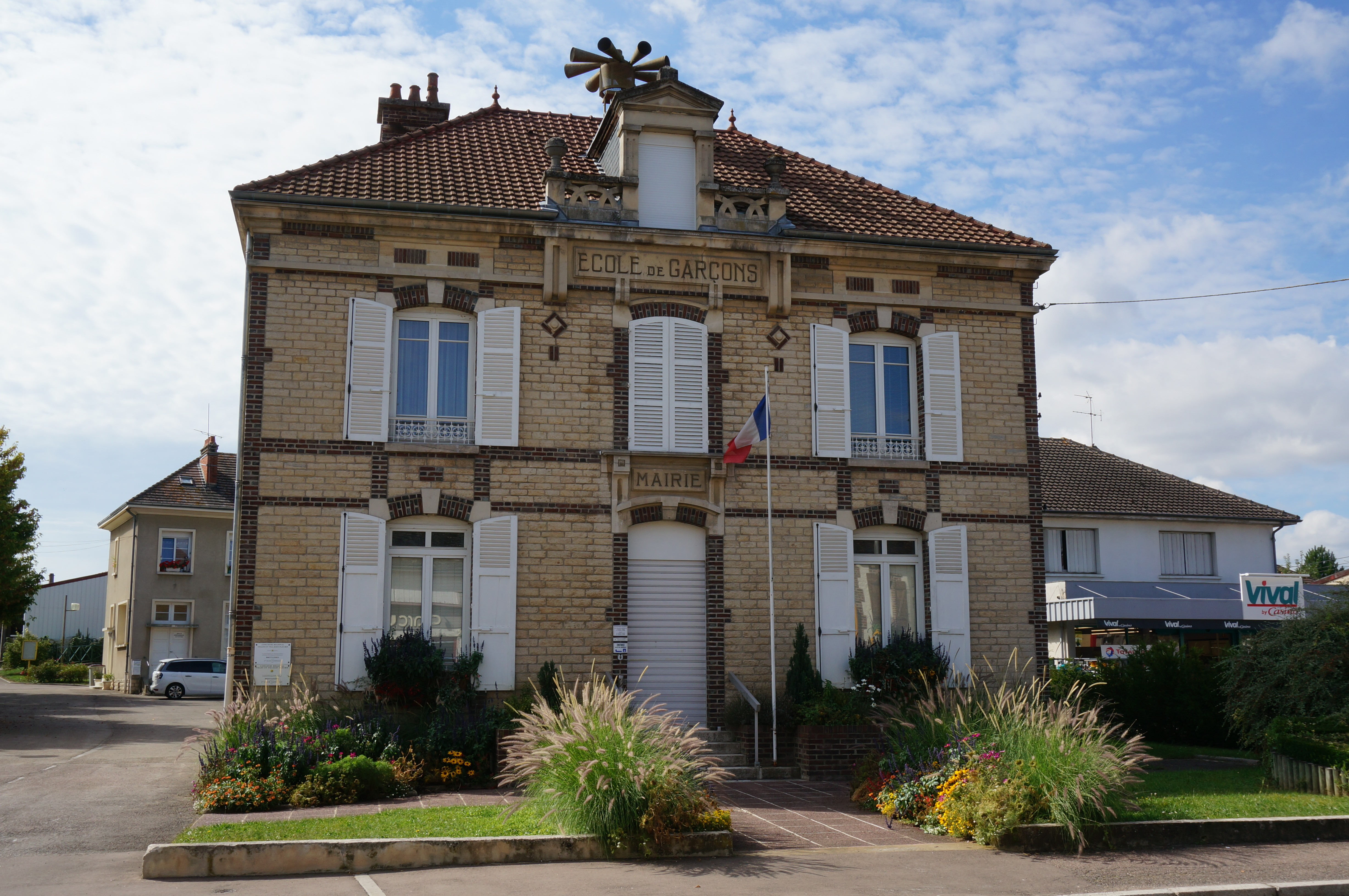 à Bréviandes.